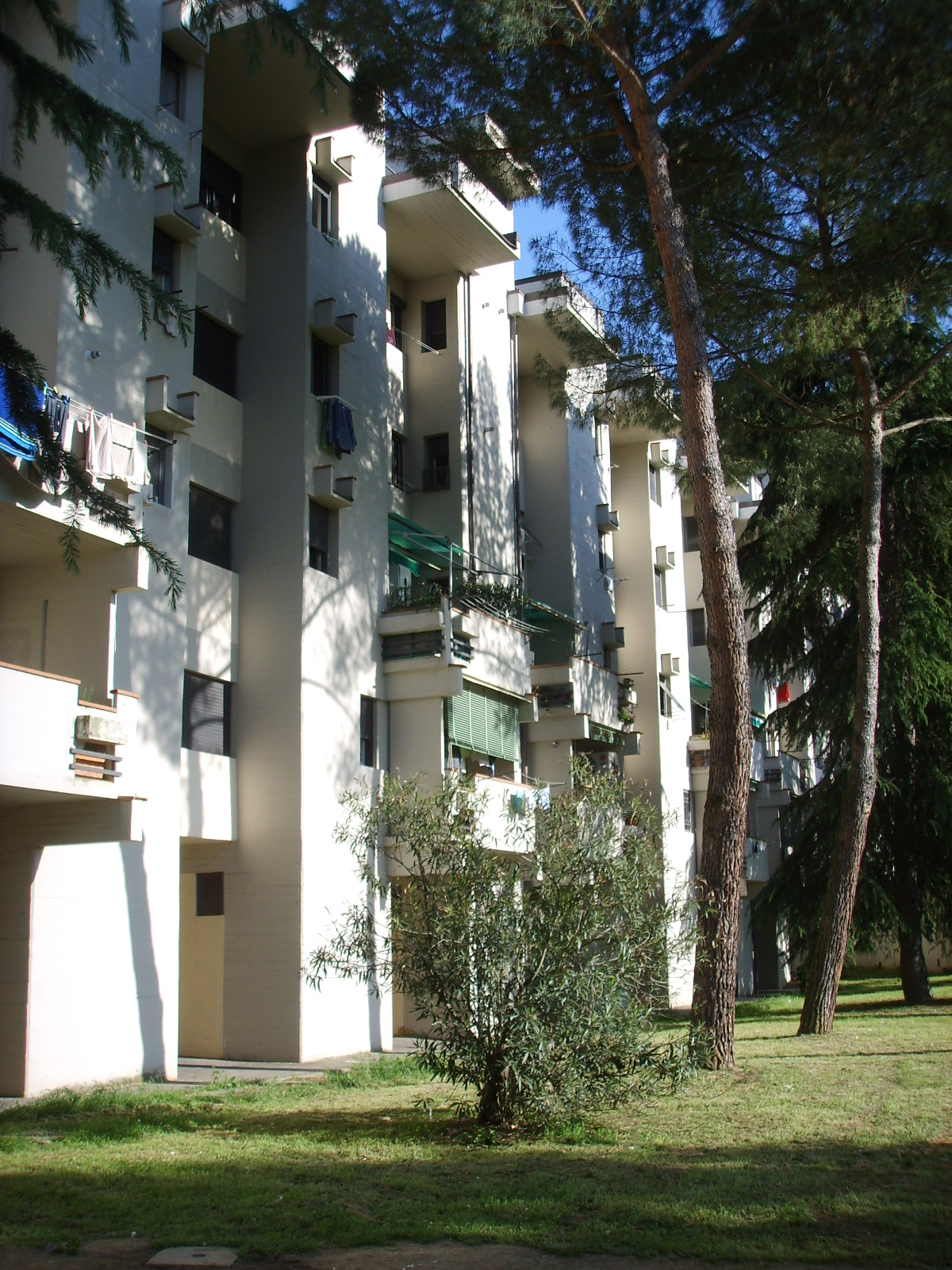 Edificio B di Sorgane